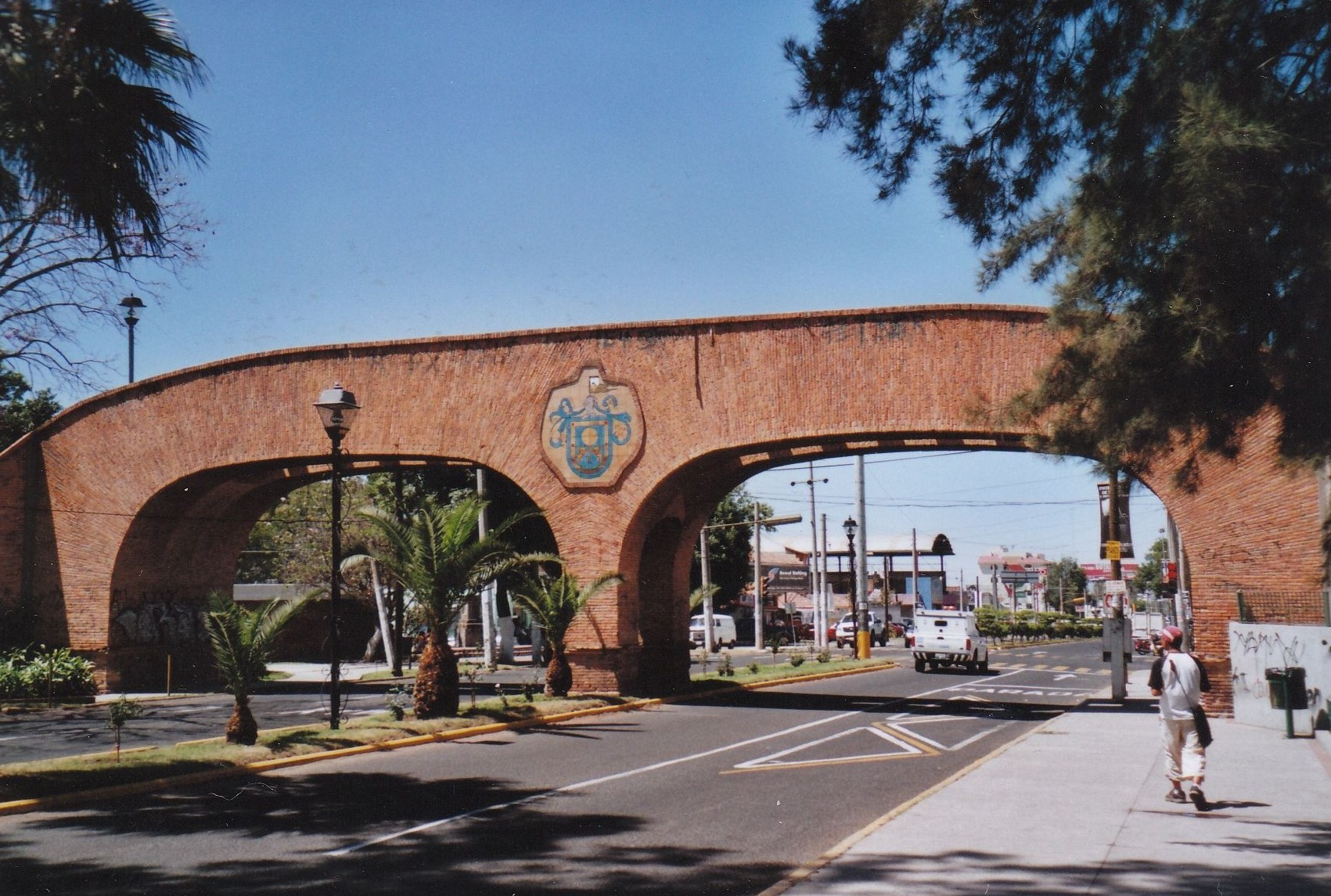 Tlaquepaque, Jalisco - el arco